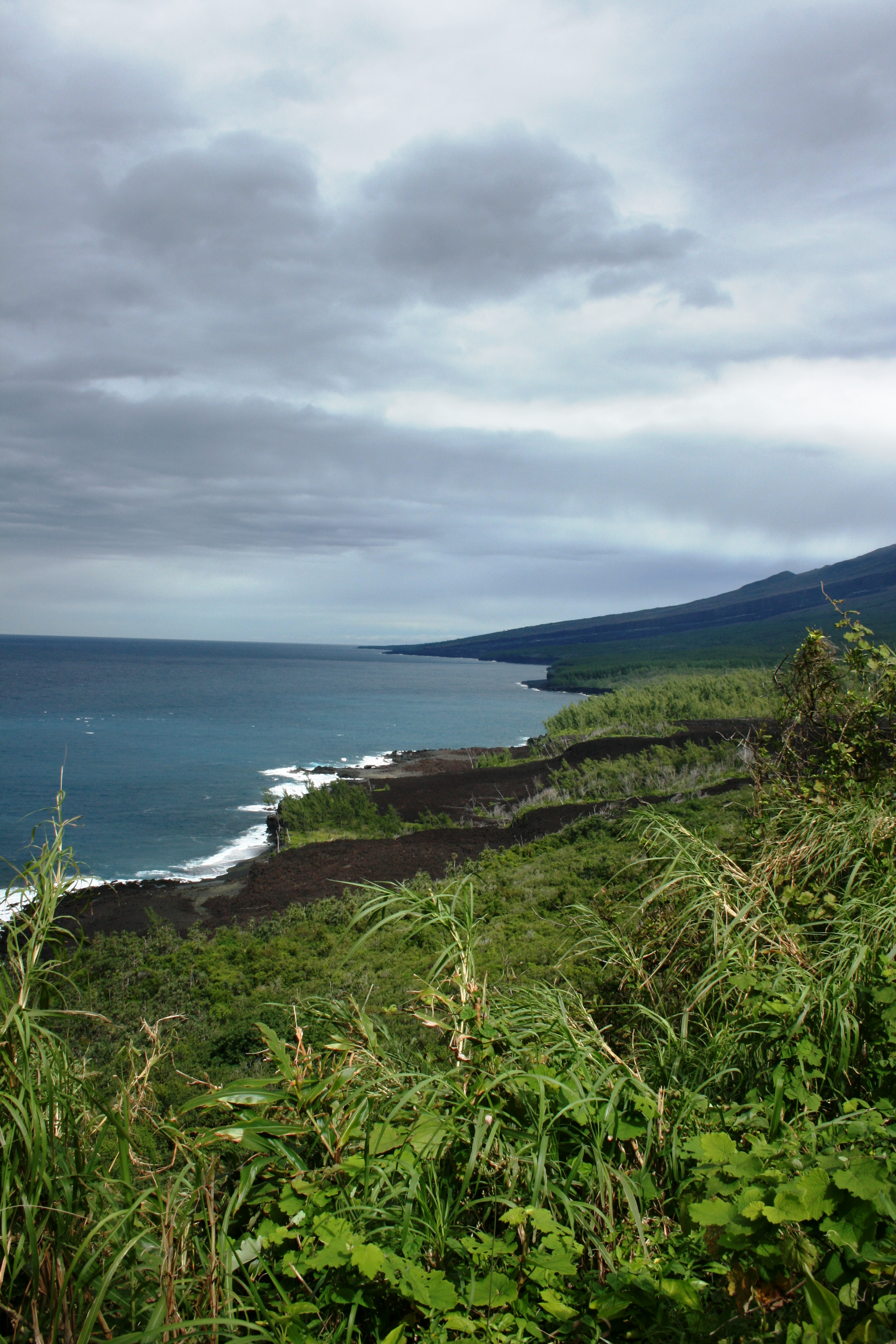 La côte du Grand Brûlé depuis le rempart de Bois Blanc, à Sainte-Rose, sur l'île de la Réunion